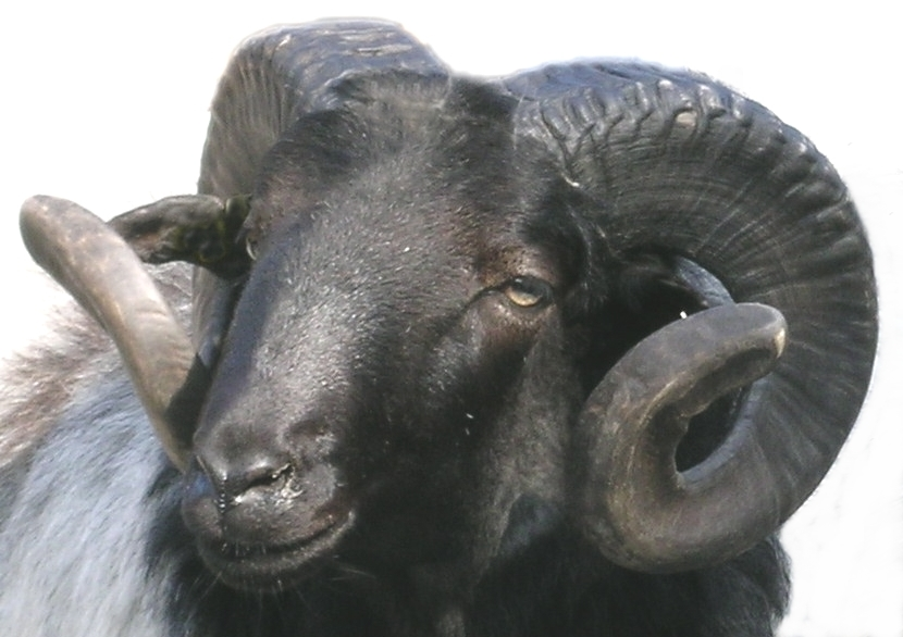 Heidschnuckenkopf